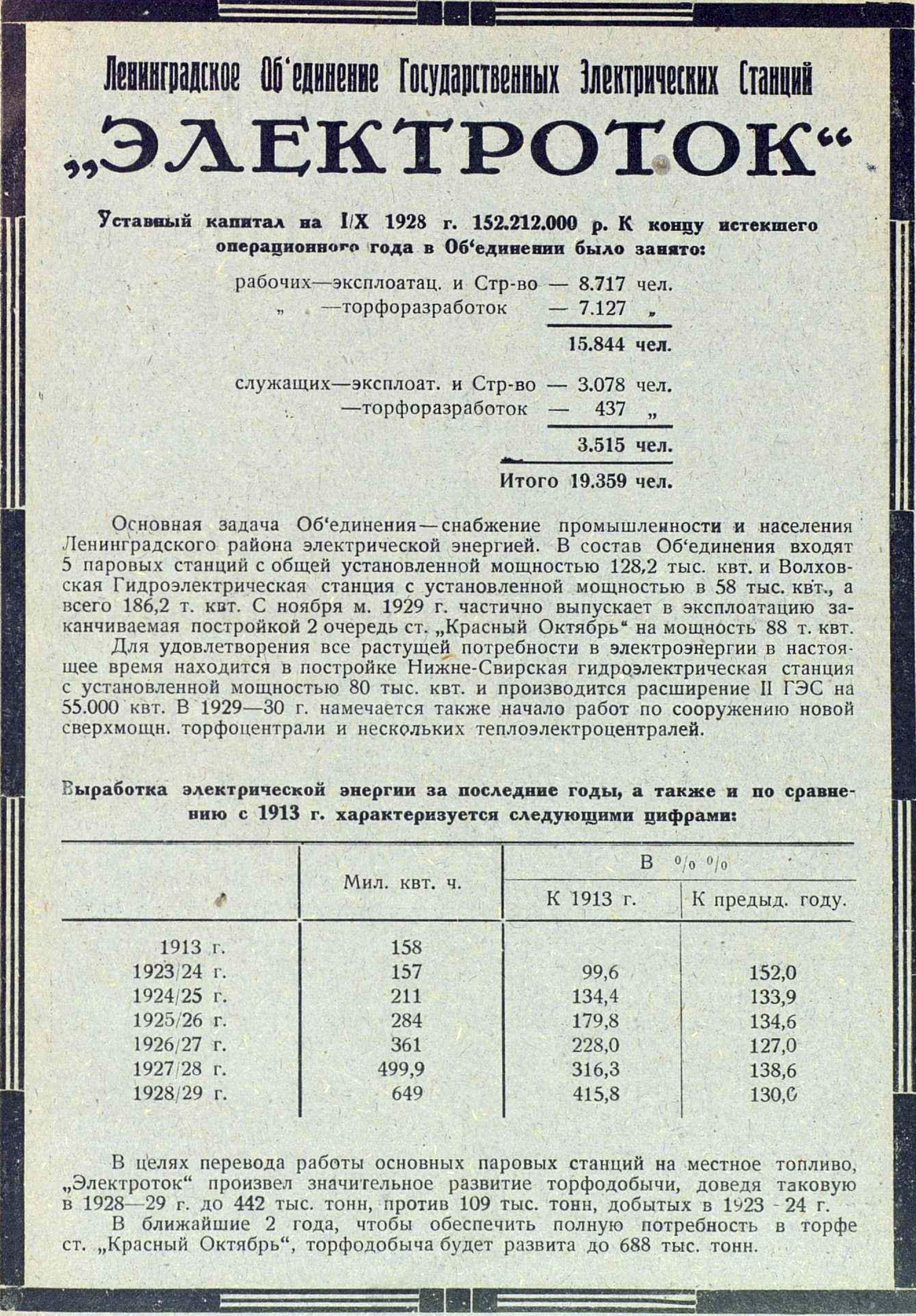 Реклама Электротока, 1930 год.